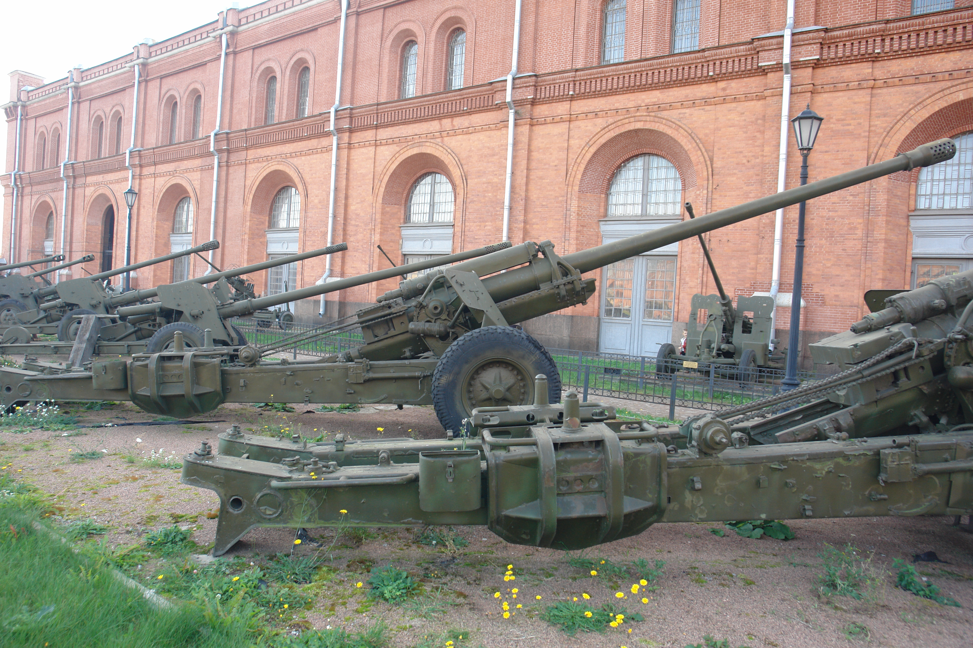 130-мм пушка М-46 (1953) Военно-исторический музей артиллерии, инженерных войск и войск связи, Санкт-Петербург.